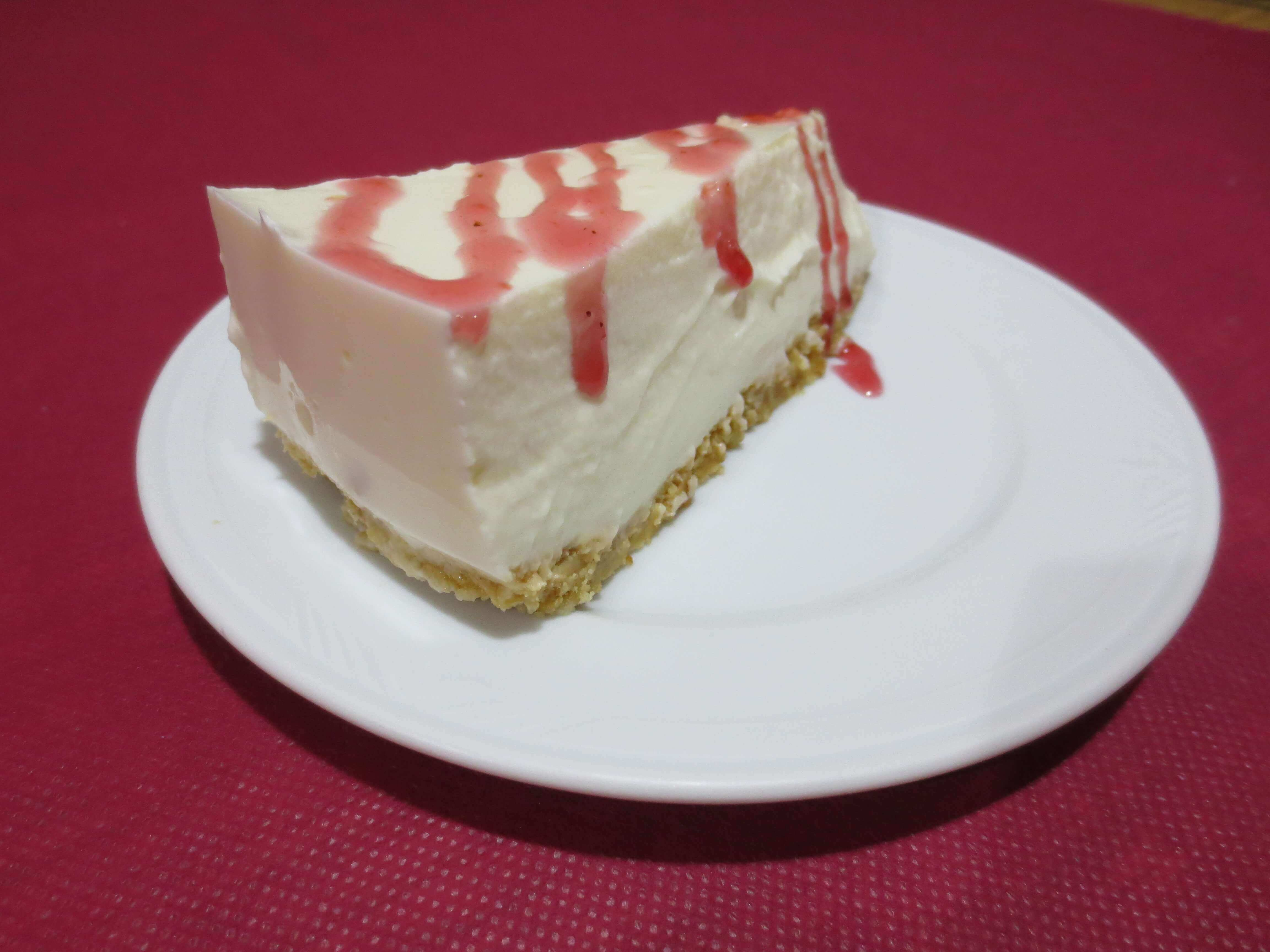 Tarta de queso elaborada con la thermomix